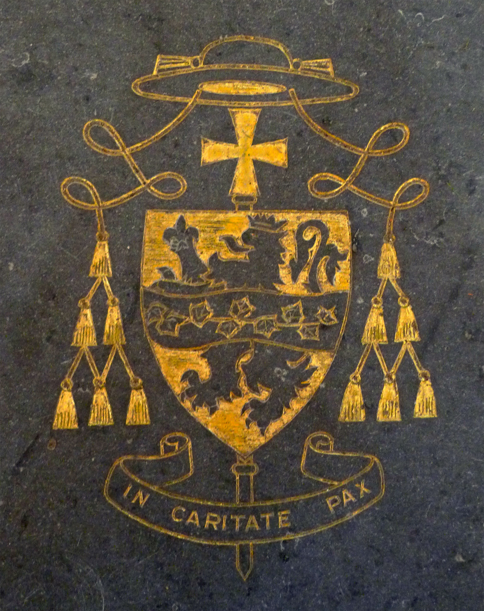 Armoiries de l'évêque de Bayeux Jean Badré